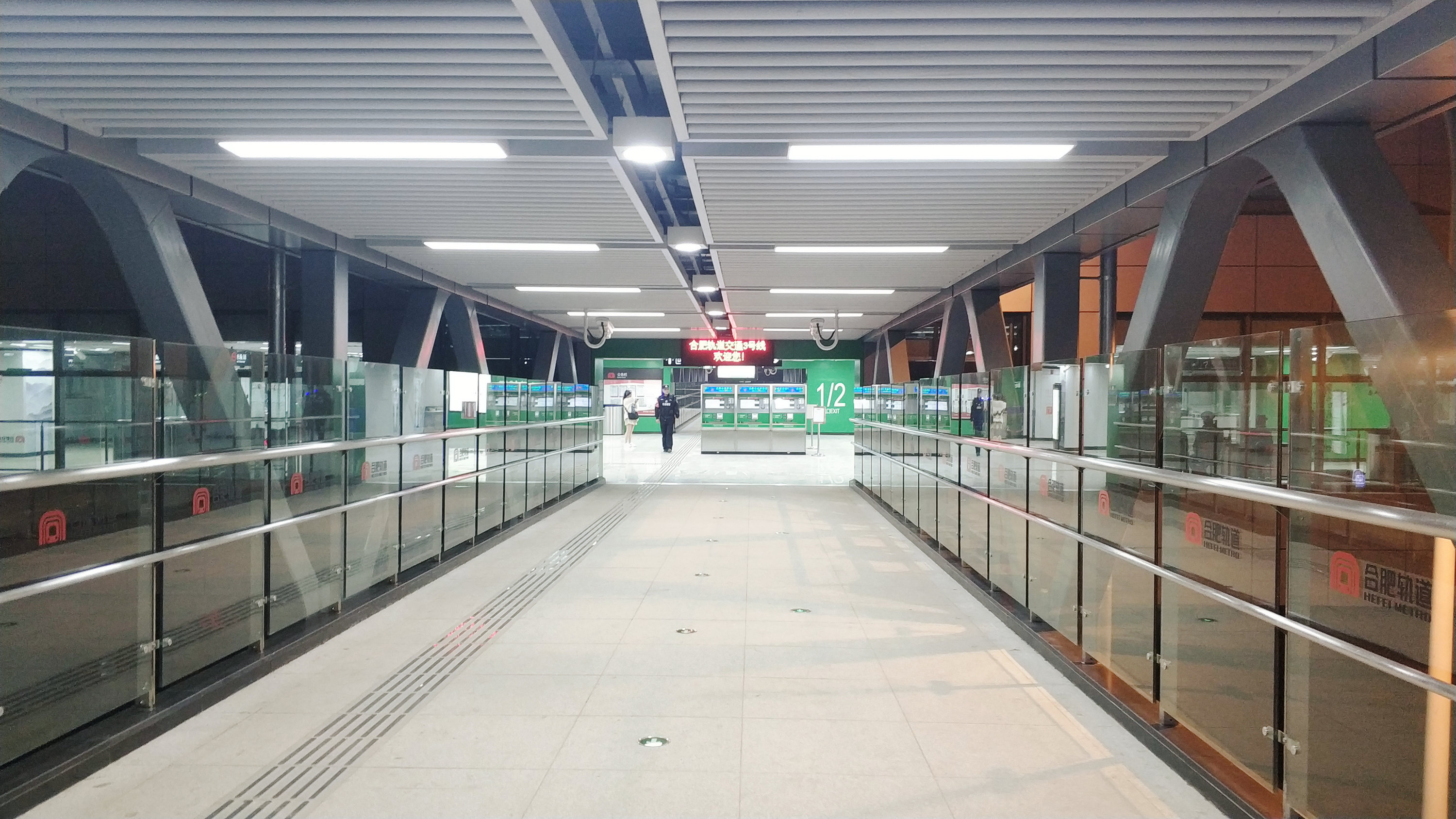 合肥轨道交通3号线,幼儿师范站,地上站点